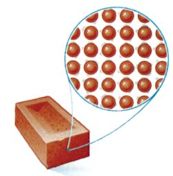 Պինդ նյութը և նրա մասնիկները